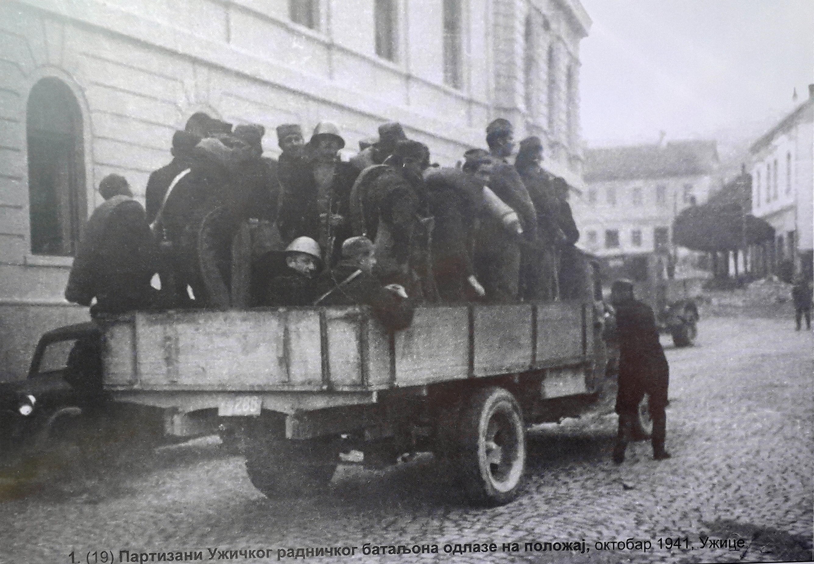 Srpskohrvatski / српскохрватски: Borci radničkog bataljona polaze na Kadinjaču novembra 1941. godine.